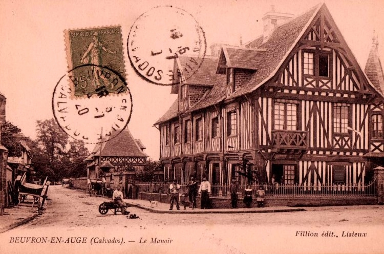 Le manoir